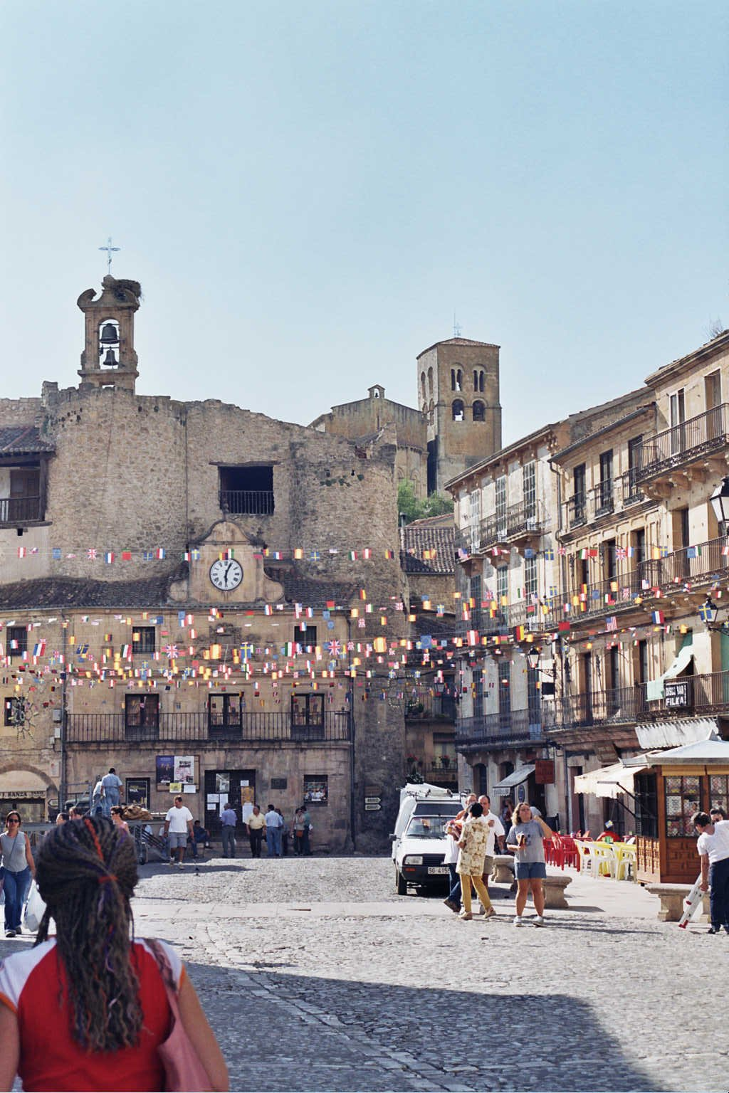 Segovia. (Castilla-León. España) Sepúlveda. Plaza Mayor. Fotografía realizada el 21 agosto de 2002 por el autor.User:Pelayo2.